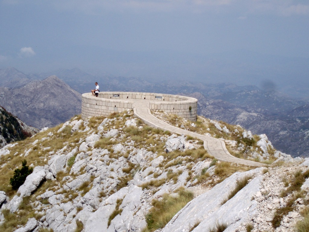 ગુજરાતી: Lovcen